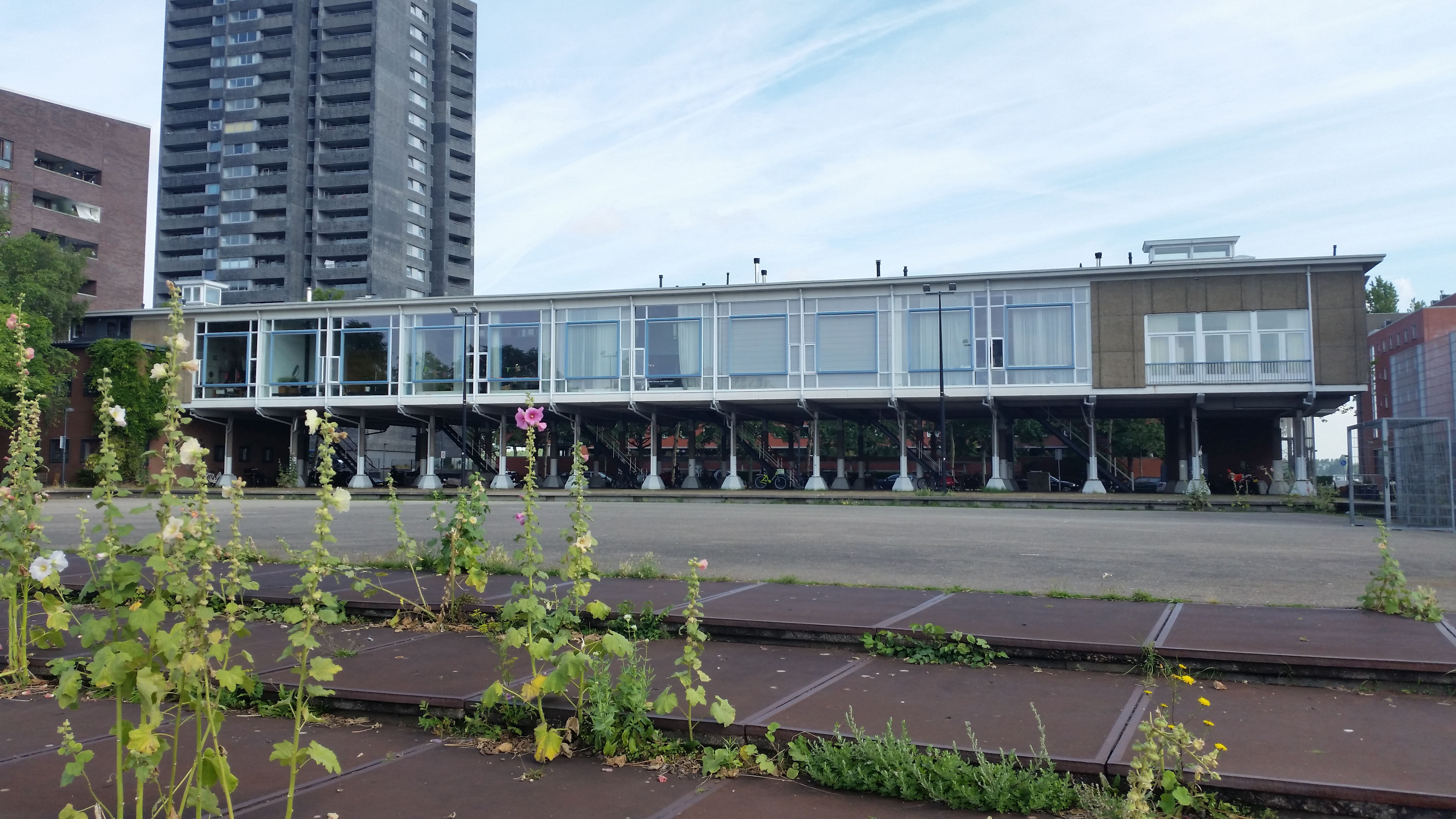 Levantplein 1-15, Amsterdam, linksachter is Skydome